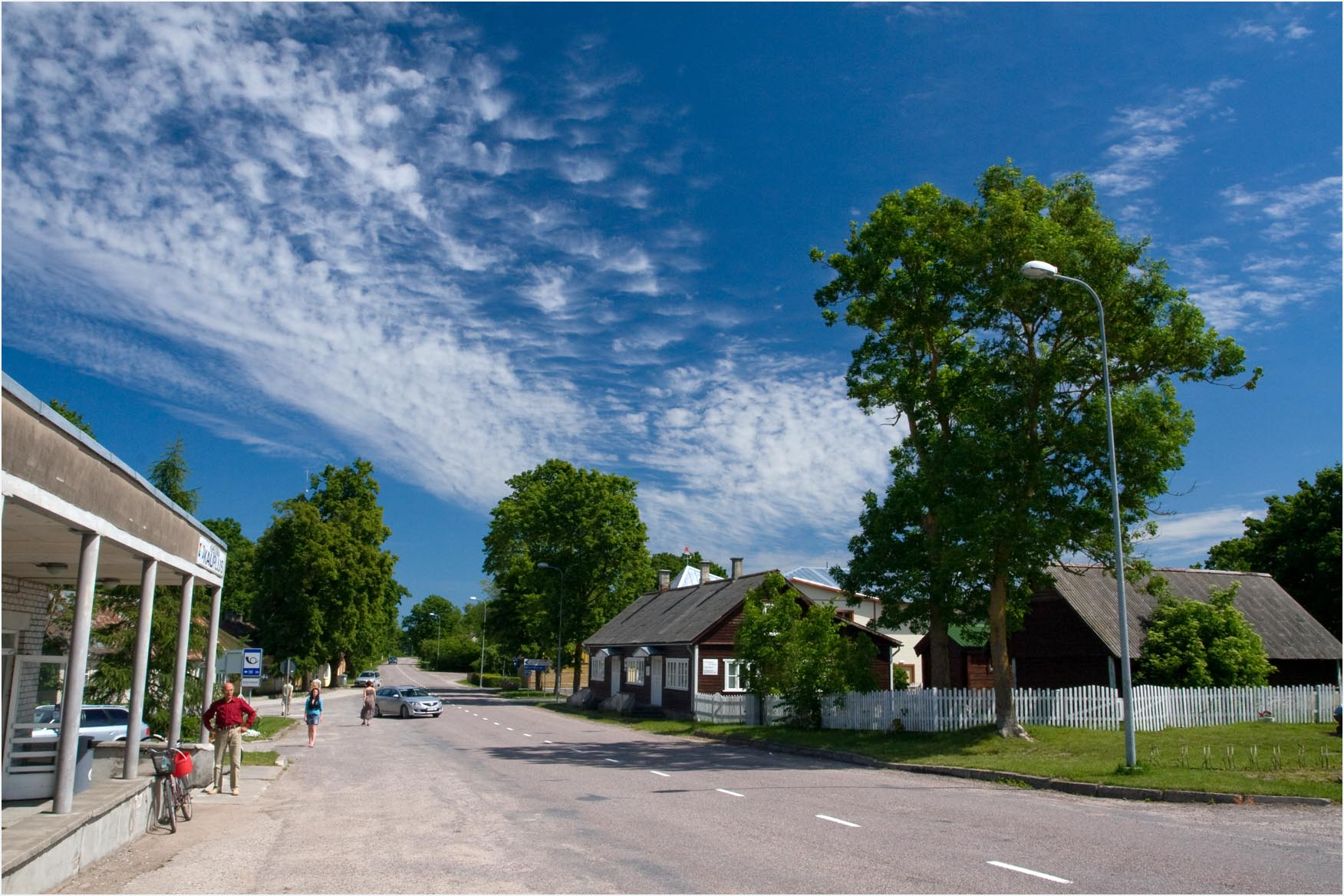 Kihelkonna